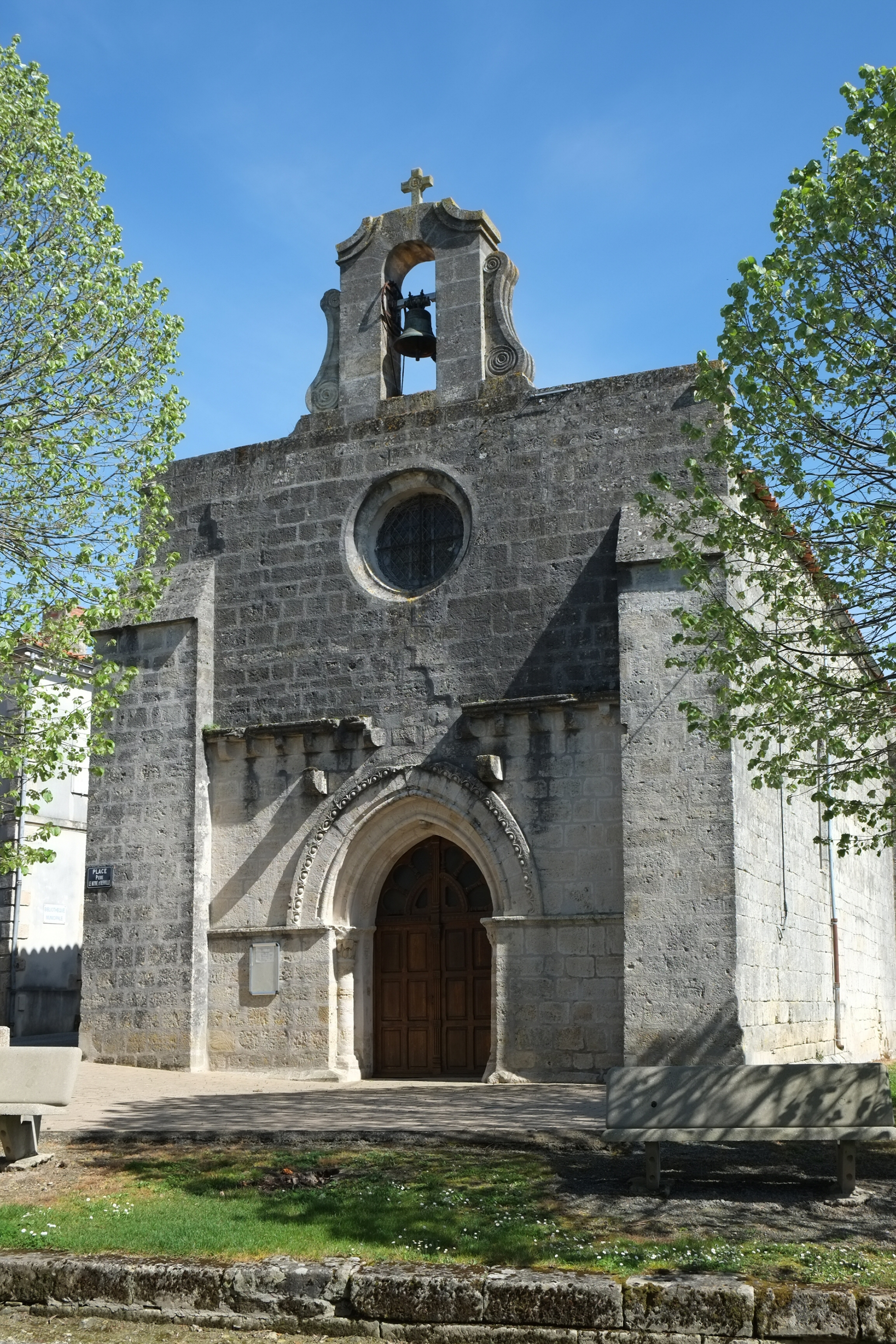 Église Saint-Pierre Ardillières Charente-Maritime France